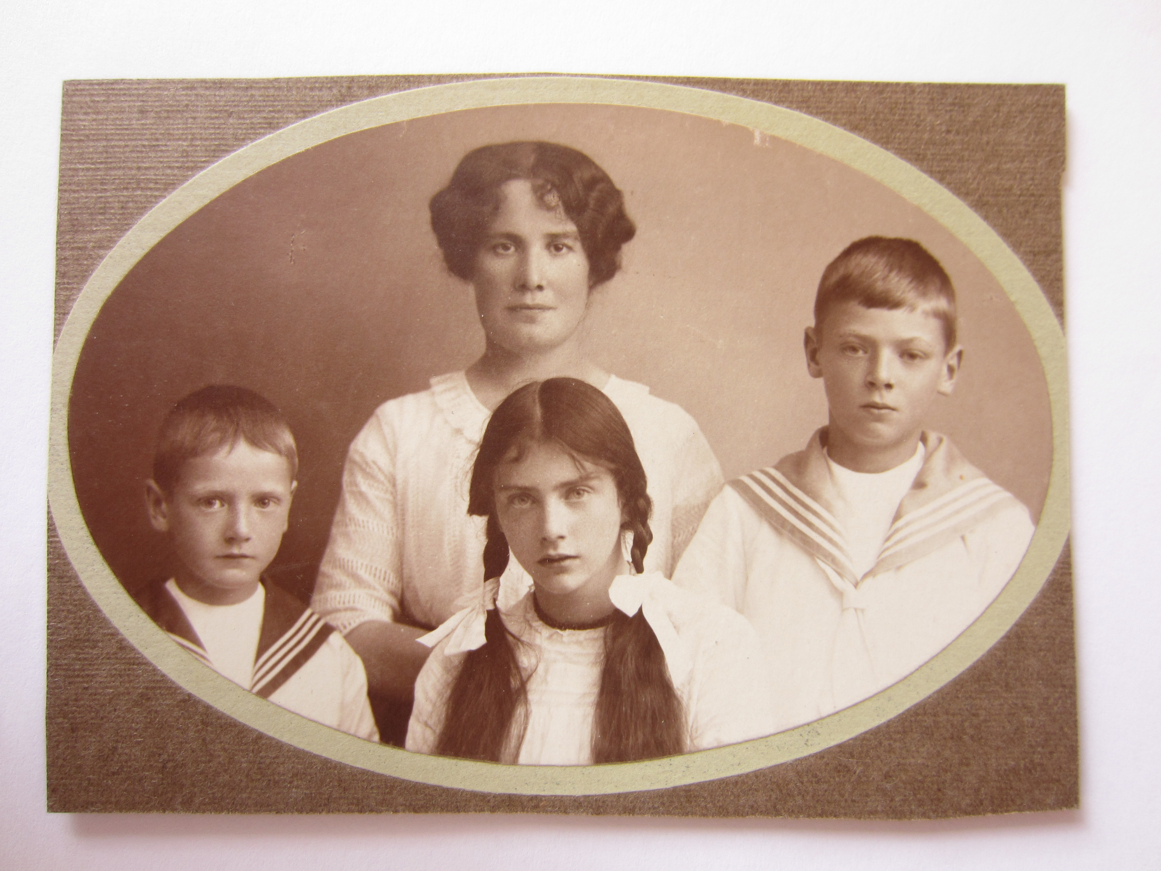 Barnen Söderberg - Mikael, Dora och Tom med husföreståndarinnan Elisabeth Andersson ("Lisa").